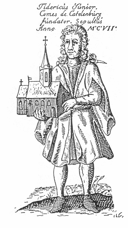 Graf Dietrich III. von Katlenburg mit Klosterkirche, zeitgenöss. Kupferstich